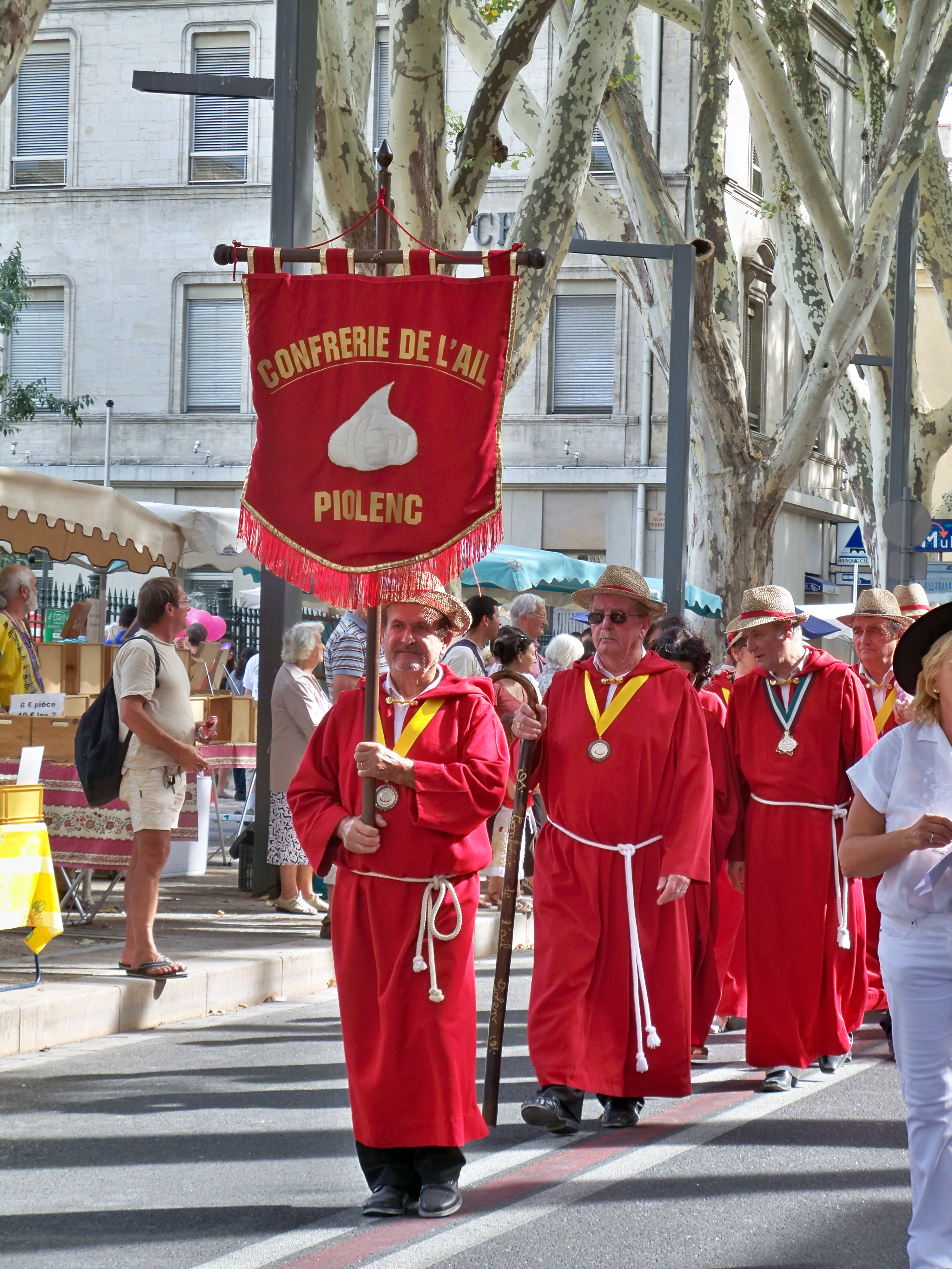 Défilé du Ban des Vendanges à Avignon, Vaucluse, France